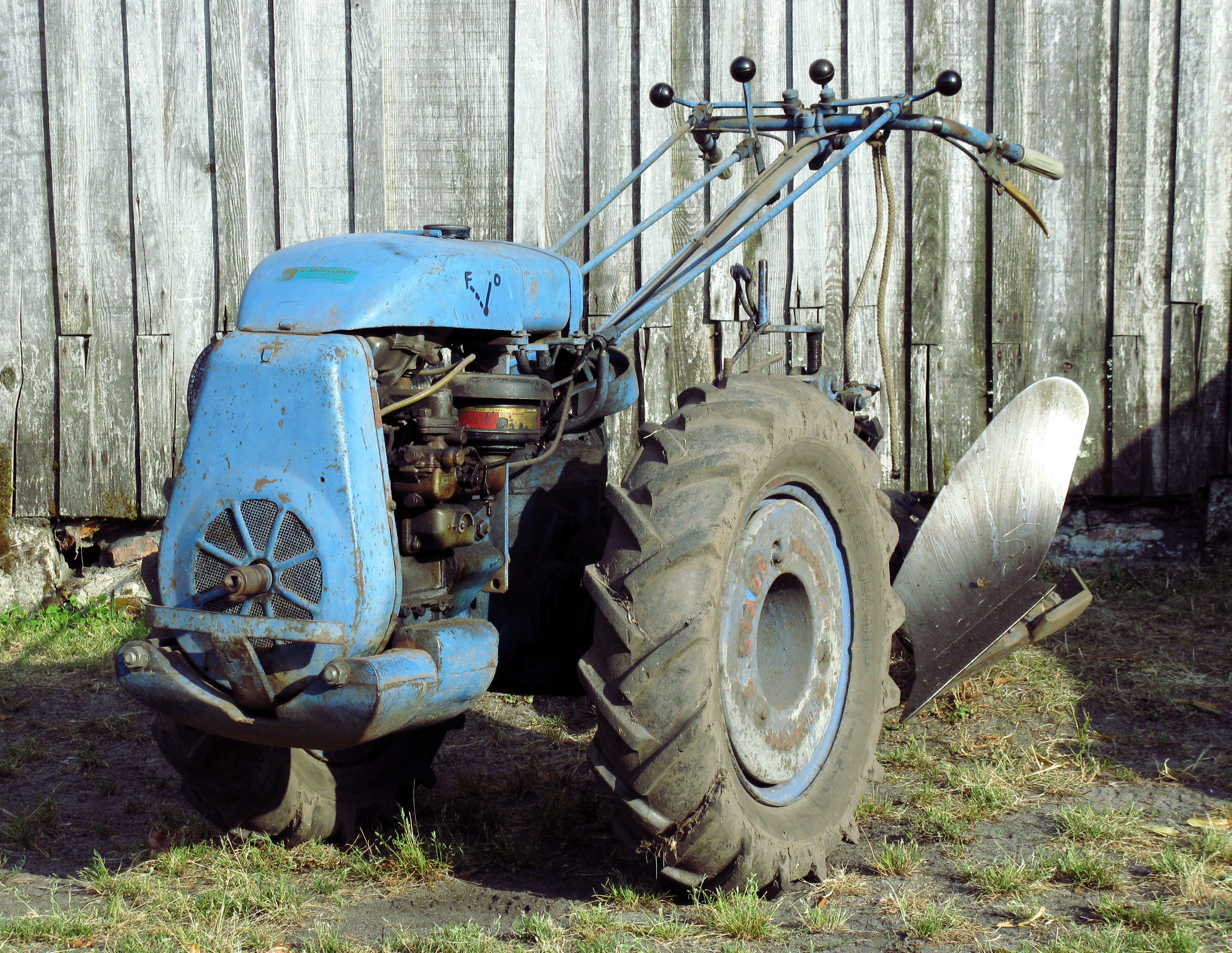 Motoculteur Staub PP3 muni d'un brabant quart de tour.